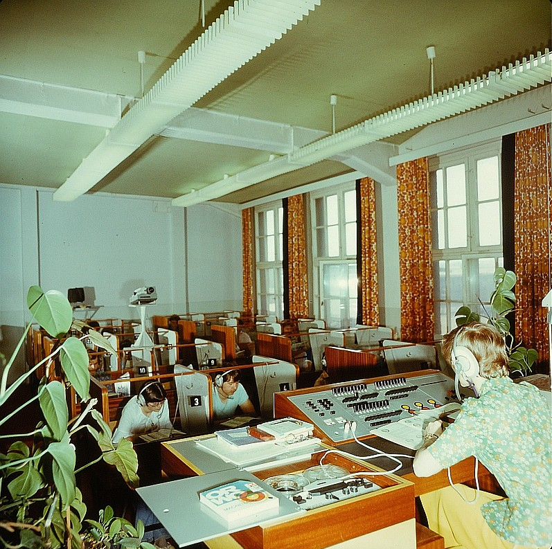 Original image description from the Deutsche FotothekSprachkabinett